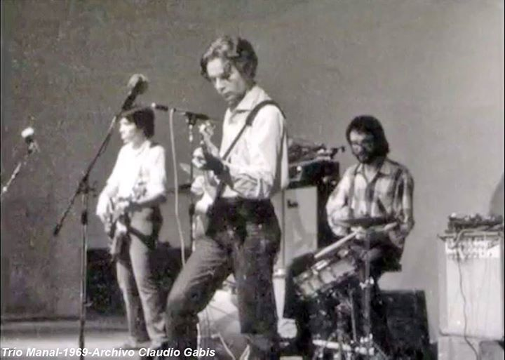 El Trío Manal actuando en una sala de la ciudad de Buenos Aires en 1969. Un detalle, arriba del amplificador se ve desarmado un grabador Geloso, el cual Claudio Gabis empleo para la distorsión de su guitarra eléctrica en el álbum Manal.